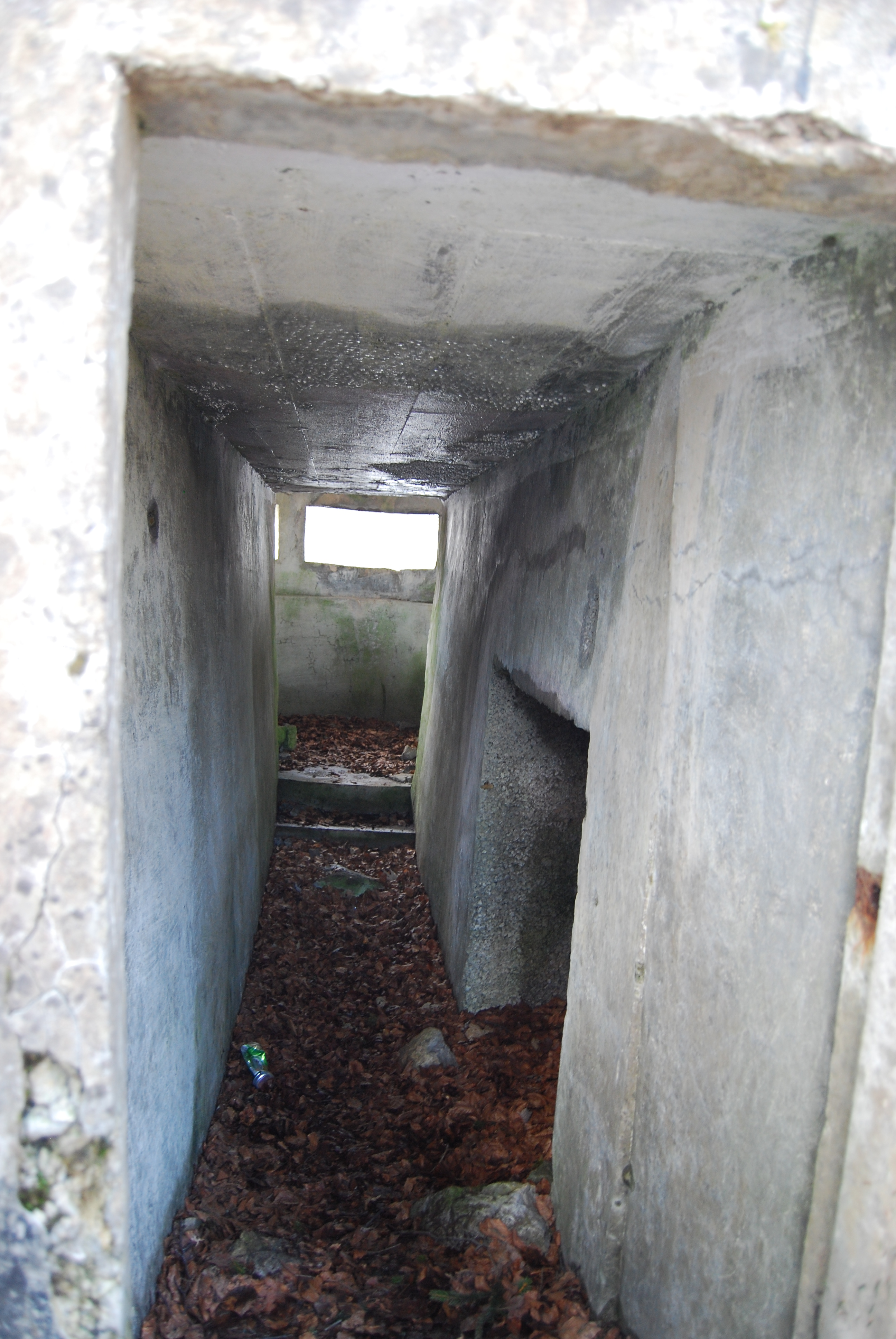 Notranjost krožnega strojničnega bunkerja.